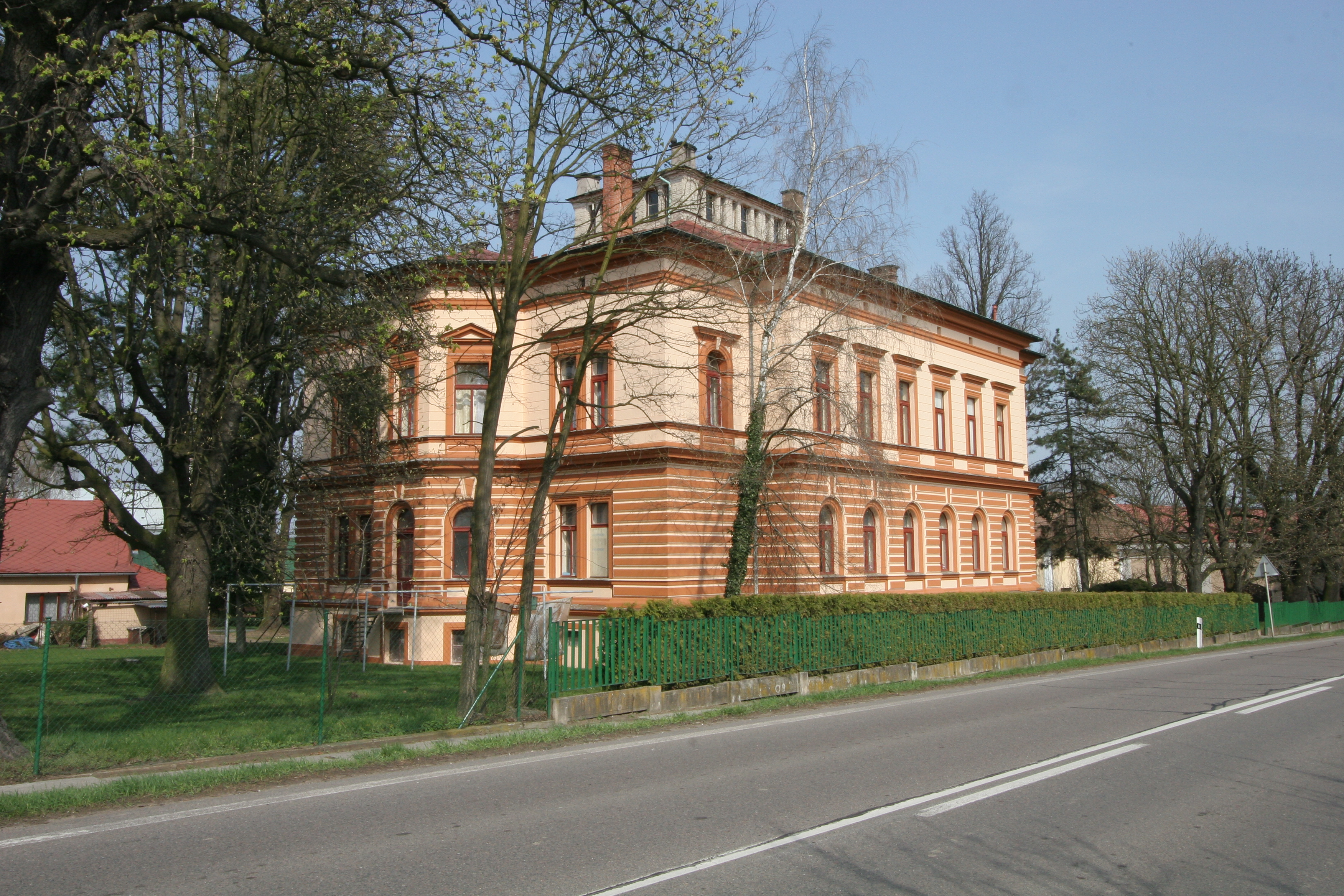 Kladruby čp. 25